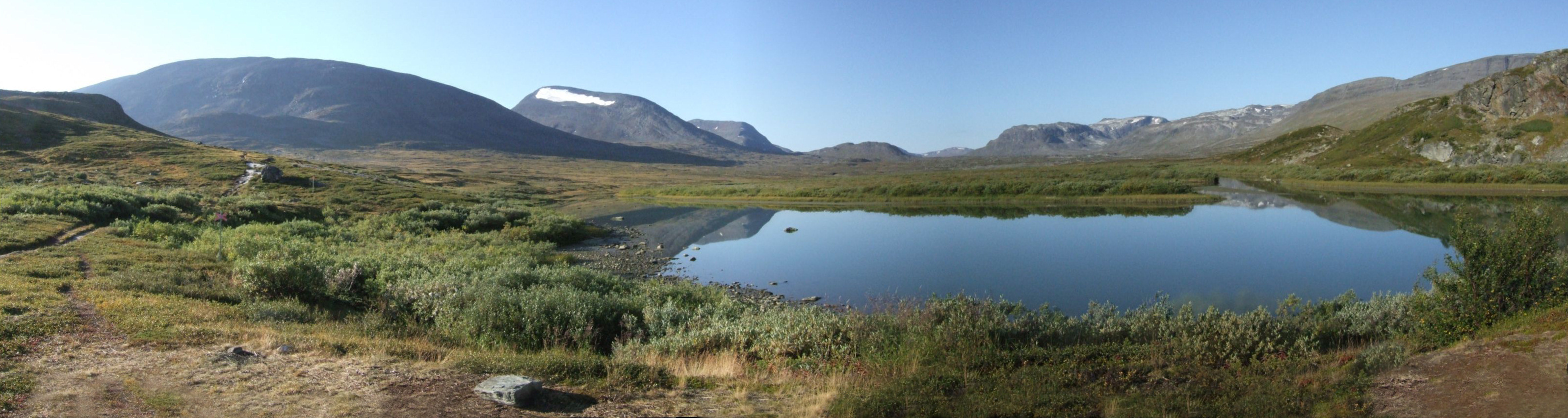 View to South near Alesjaure Hut, on the Kungsleden trail(Lapland, Sweden). Vue vers le sud, à proximité du refuge d'Alesjaure sur le Kungsleden(Laponie, Suède)